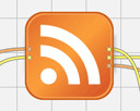 Flux RSS